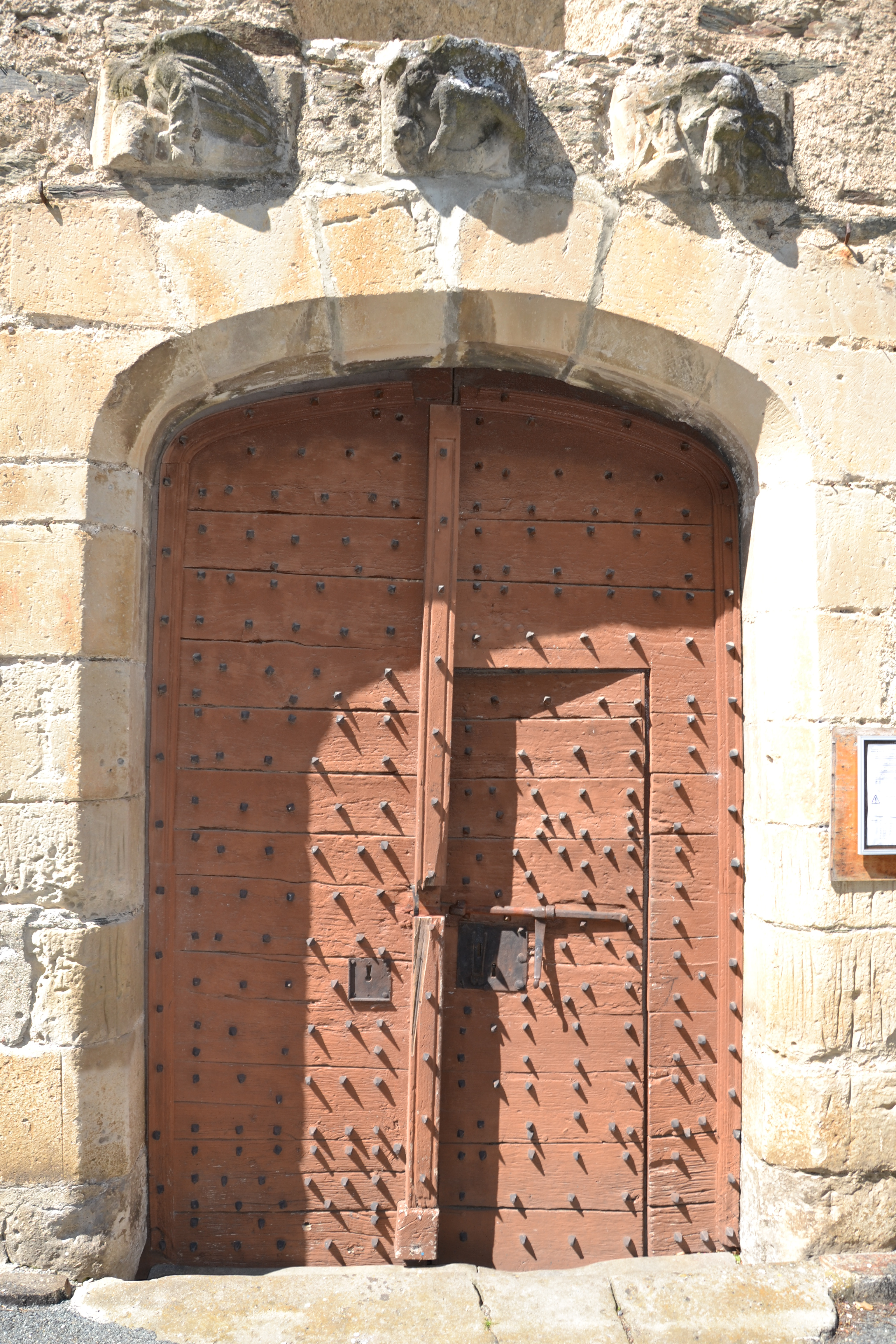 Portail à vanteaux cloutés de l'église Saint-Etienne du Mas-Cabardès